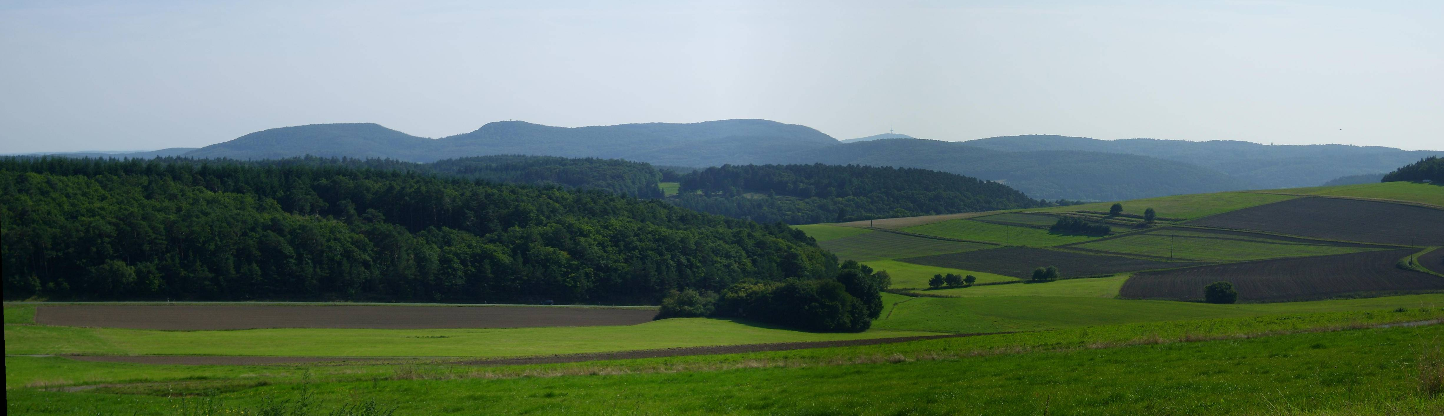 Die markanten Erhebungen am Ostrand des Naturraumes Zollbuche von Norden aus gesehen (von rechts bis zur Mitte): Dreisberg (448m), Koppe (454m) und Hemmerich (470m). Rechts der Mitte erkennt man den entfernteren Dünsberg (498m), während der Zollbuche-Höhenzug nach rechts in die Bad Endbacher Platte (bis 488m) übergeht. Aufnahmepos östl. von Rachelshausen (Koordinatenangaben sind geschätzt - vergl. auch mit gemessenen Koordinaten von File:Dreisberg-Koppe-Hemmerich-Dünsberg-Platte (002).PNG)